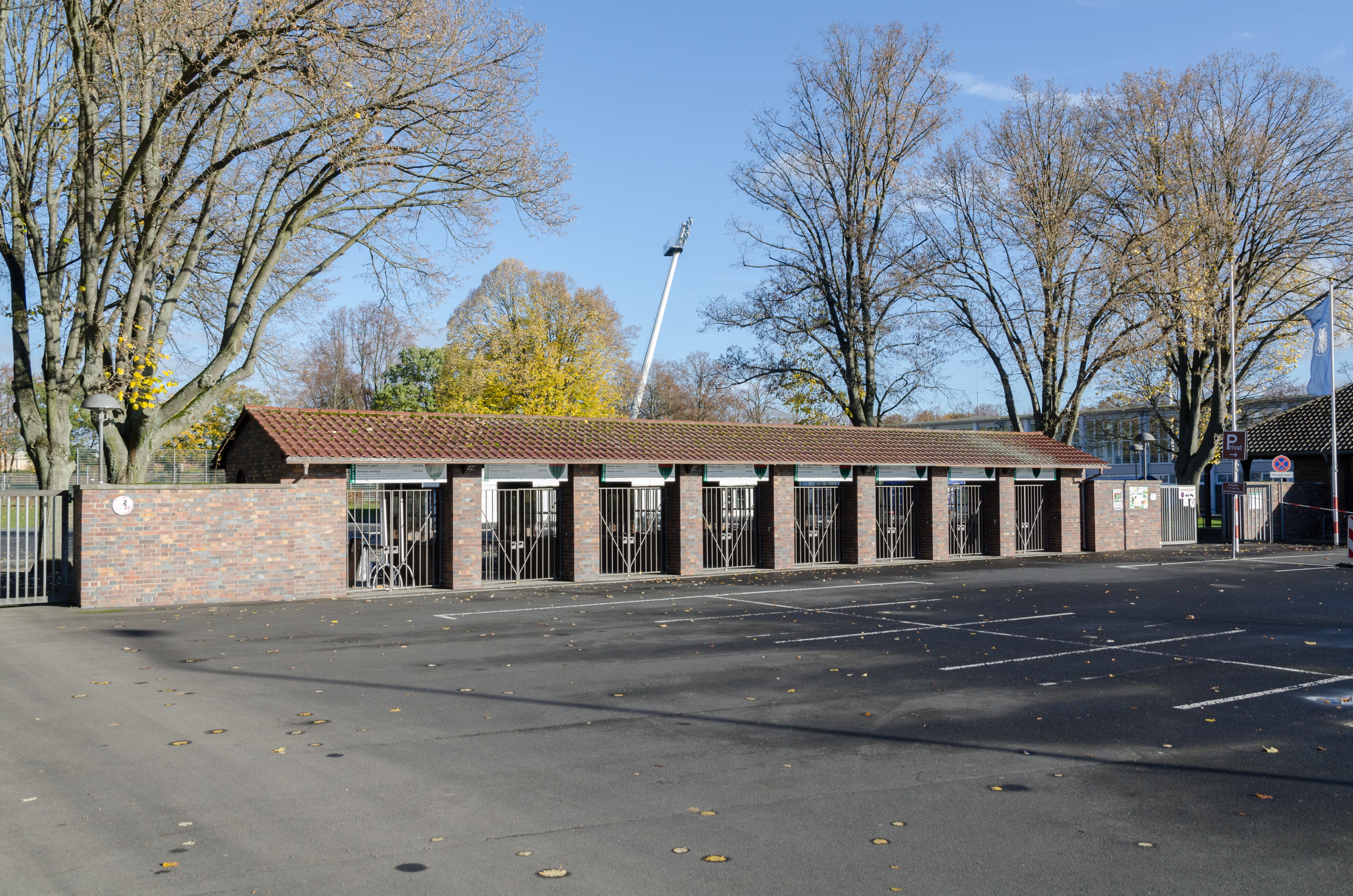 Schweinfurt, Willy-Sachs-Stadion, Kassenhäuschen